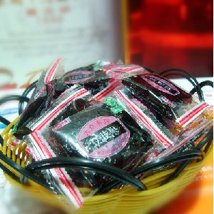 这是我家乡特产——豆豉果